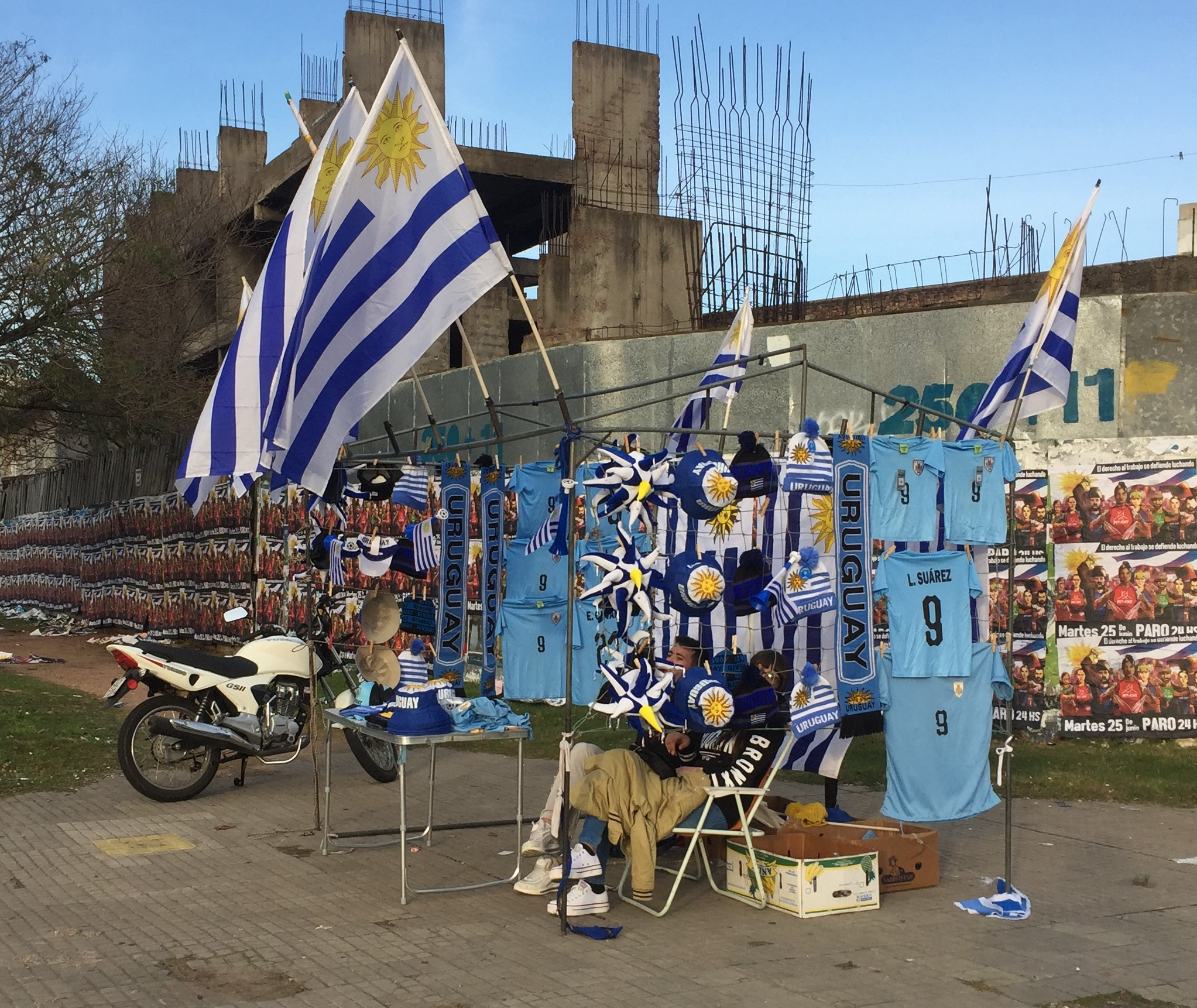 Durante la Copa América 2019 de Brasil, un vendedor callejero ofrece banderas uruguayas, camisetas de la selección celeste y otros artículos para la hinchada, en la esquina de Br. Artigas y Av. Millán, Montevideo.